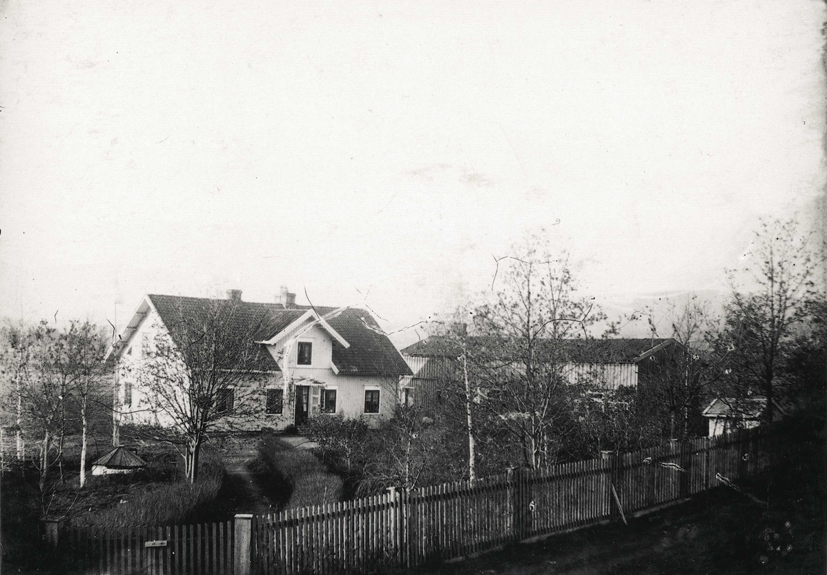 Solitude løkke ca. 1880